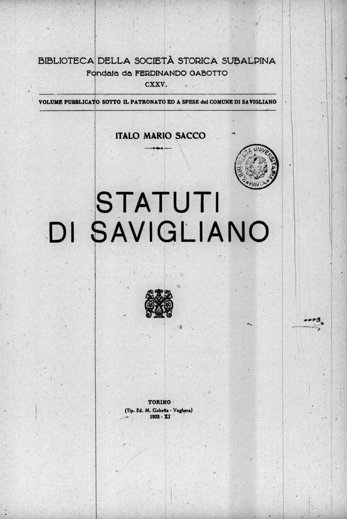 Frontespizio